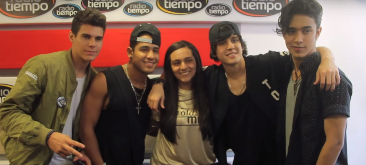 Los ganadores del reality musical 'La Banda' estuvieron en encuentro cercano con sus fans en Colombia. También brindaron un show sin precedente para todos sus seguidores en nuestro país.'